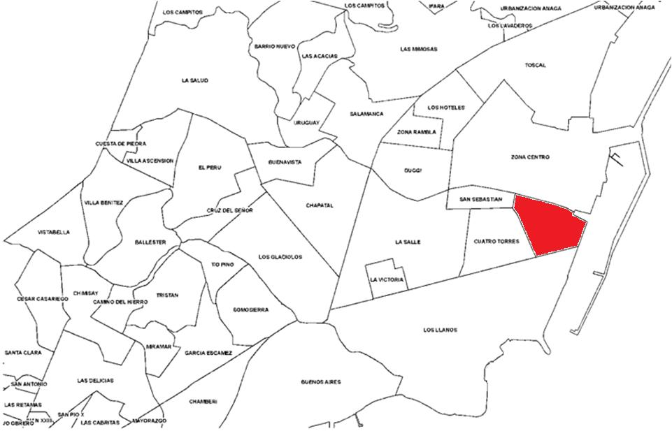 ubicación del barrio